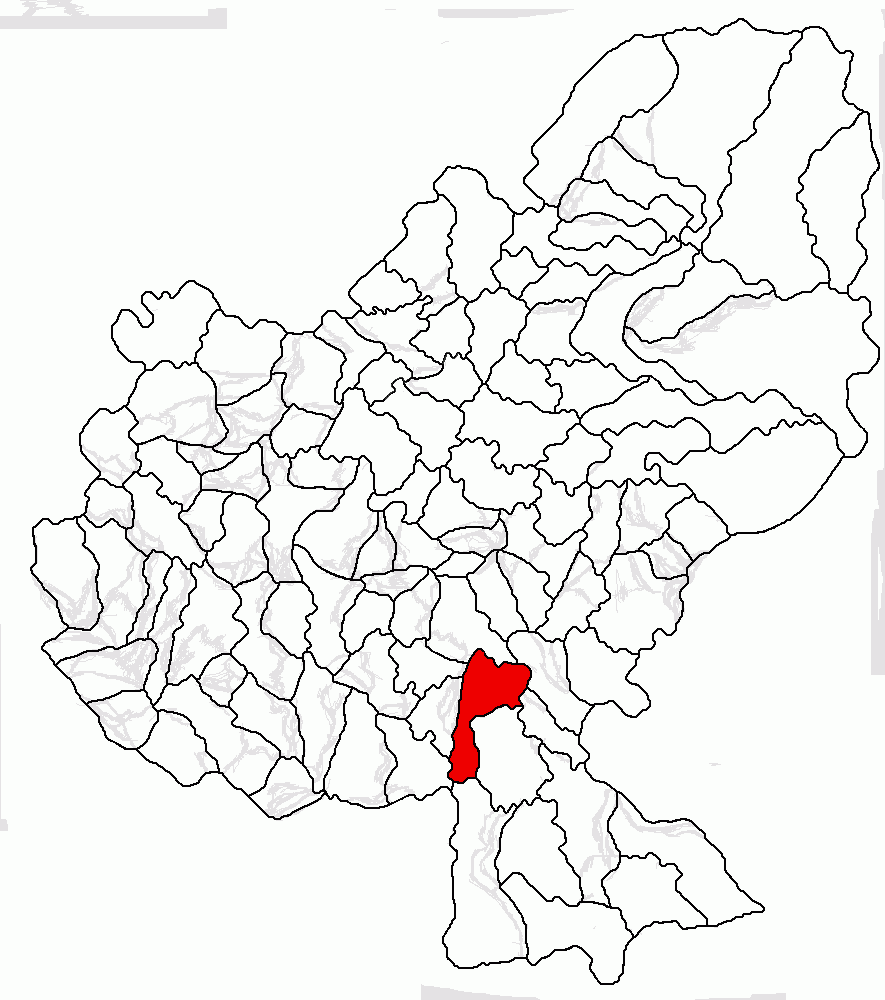 Categorie:Hărţi ale judeţului Mureş